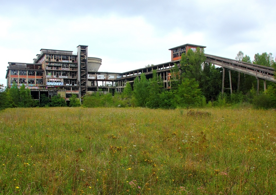 friche industrielles de la mines